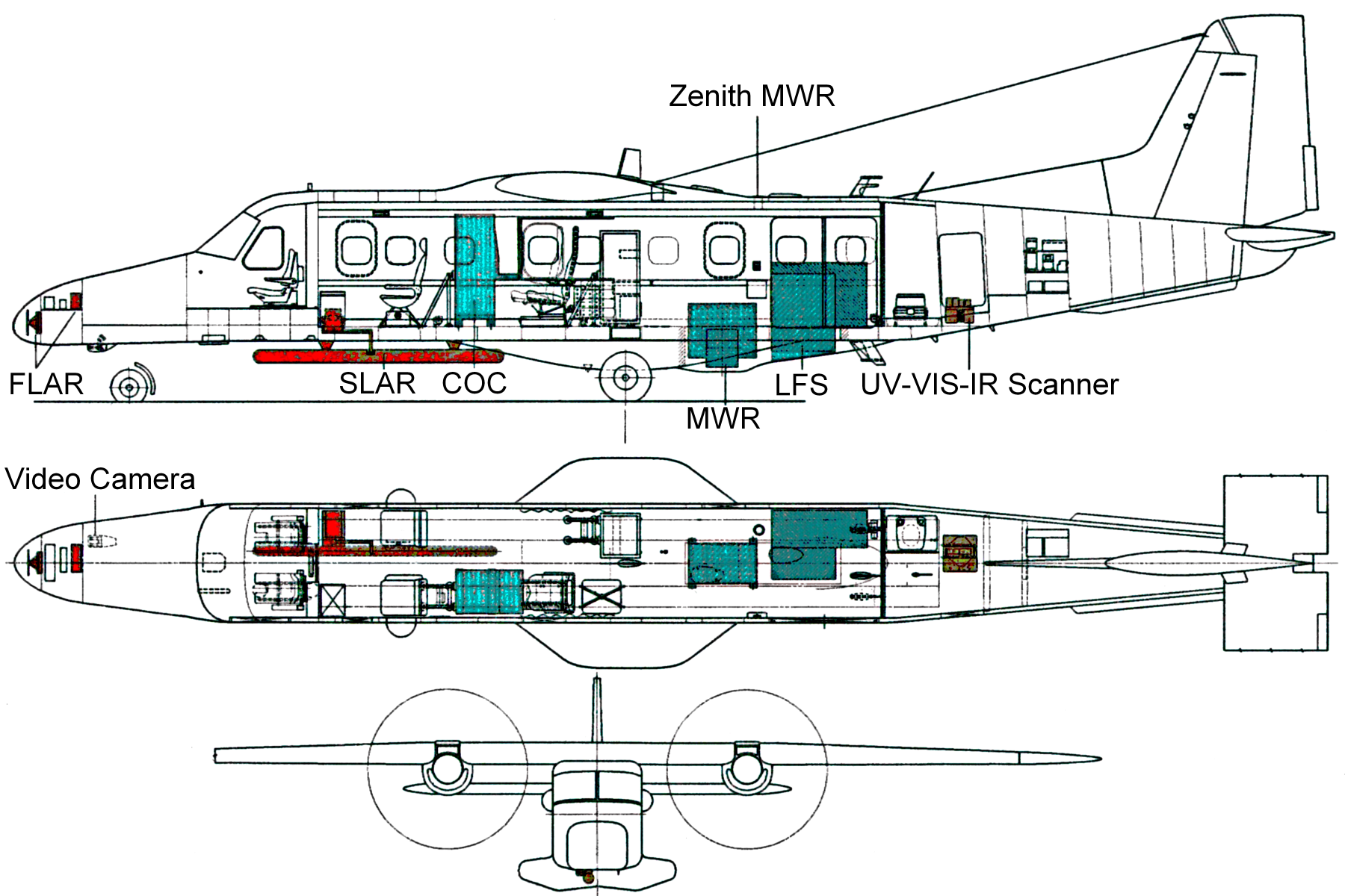 Schema eines Überwachungsflugzeugs, basierend auf der Do 228